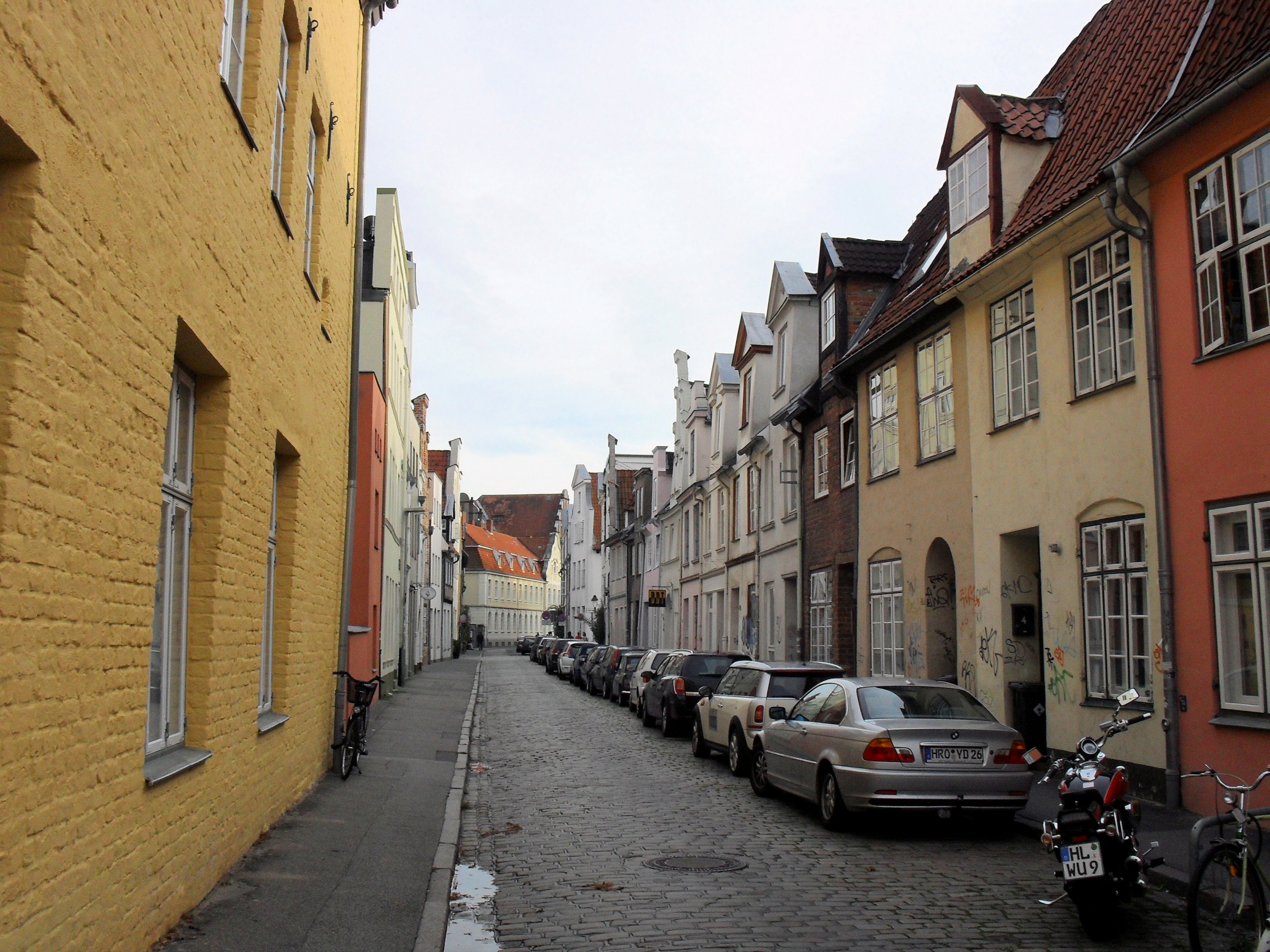 Der Tünkenhagen in Lübeck